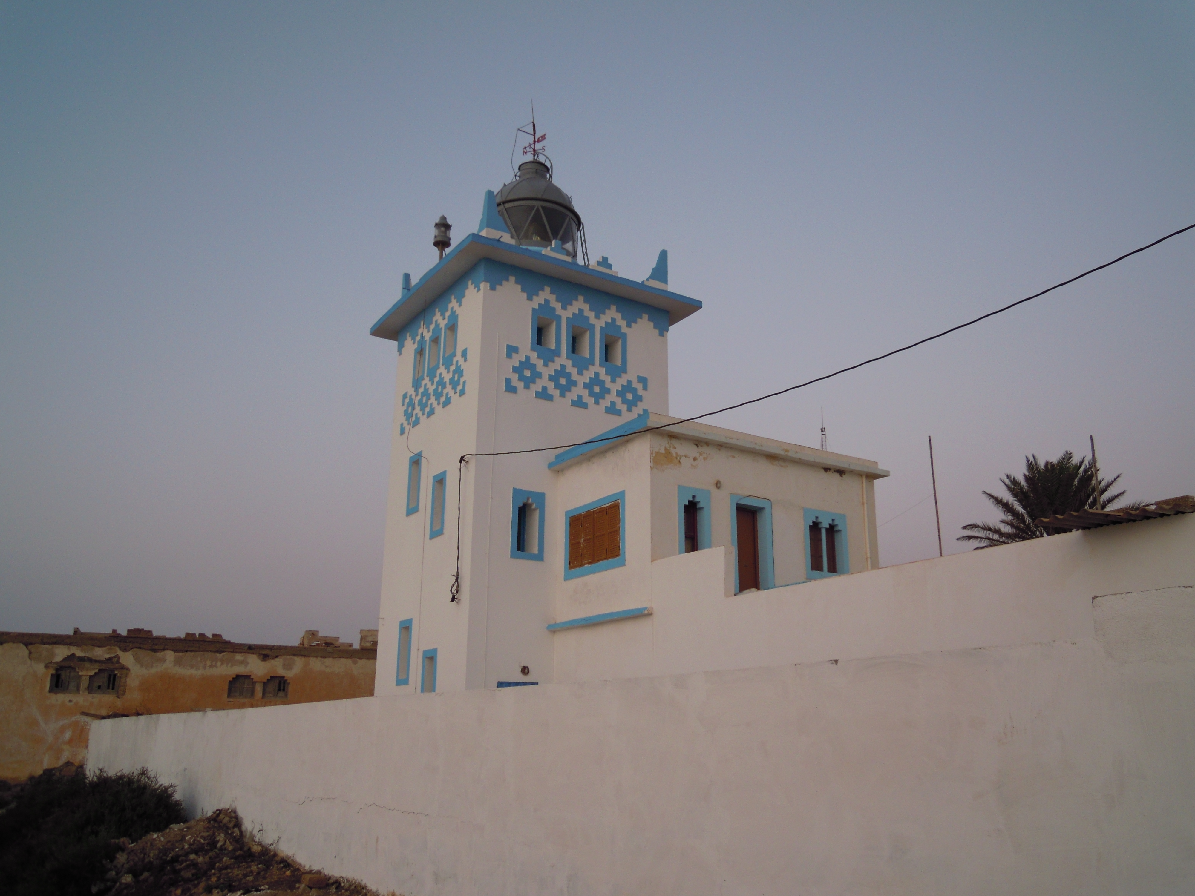 Faro de Sidi Ifni